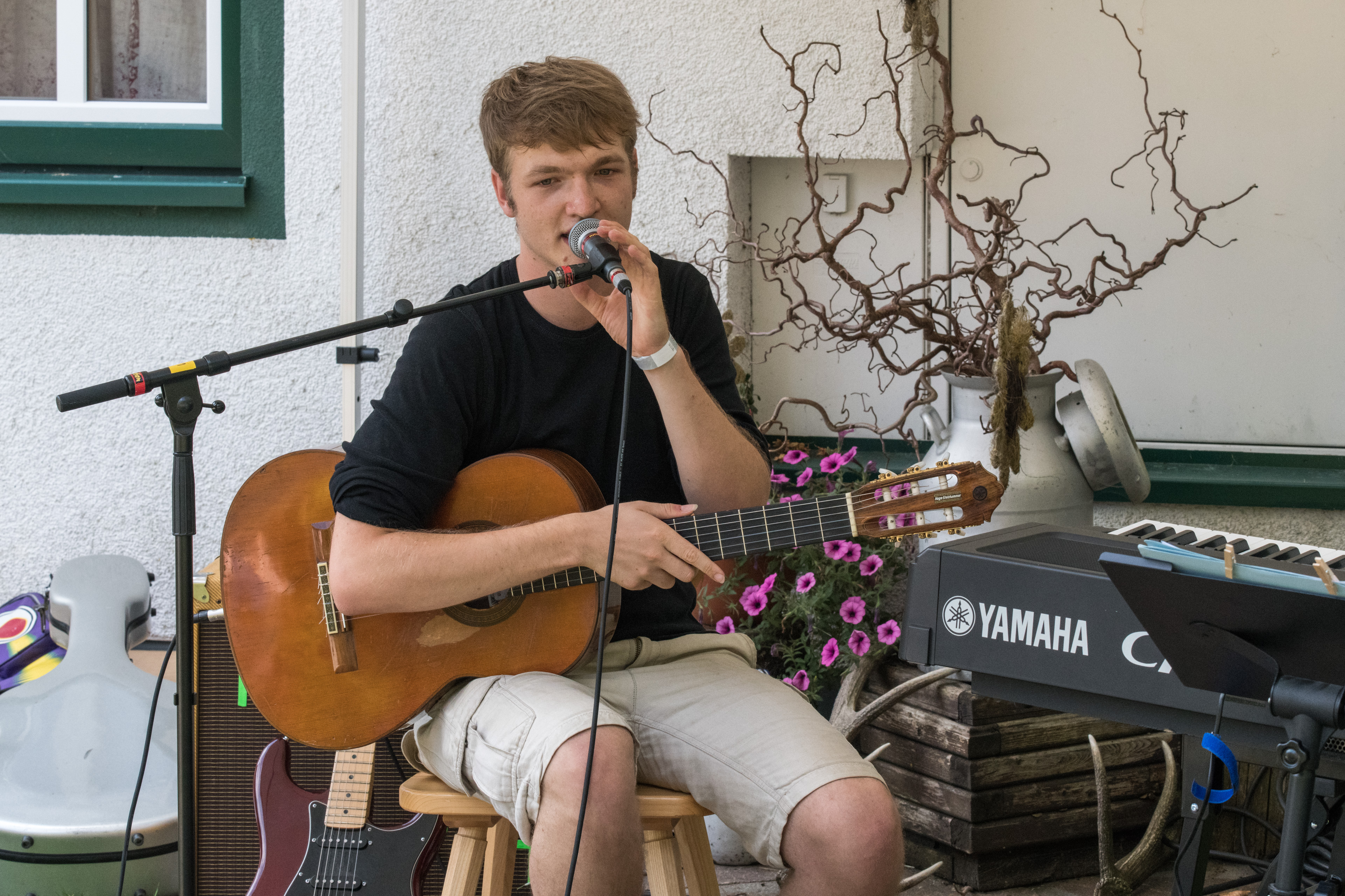 Felix Kramer bei 'Sprudel, Sprudel & Musik' in Gößl (2018)